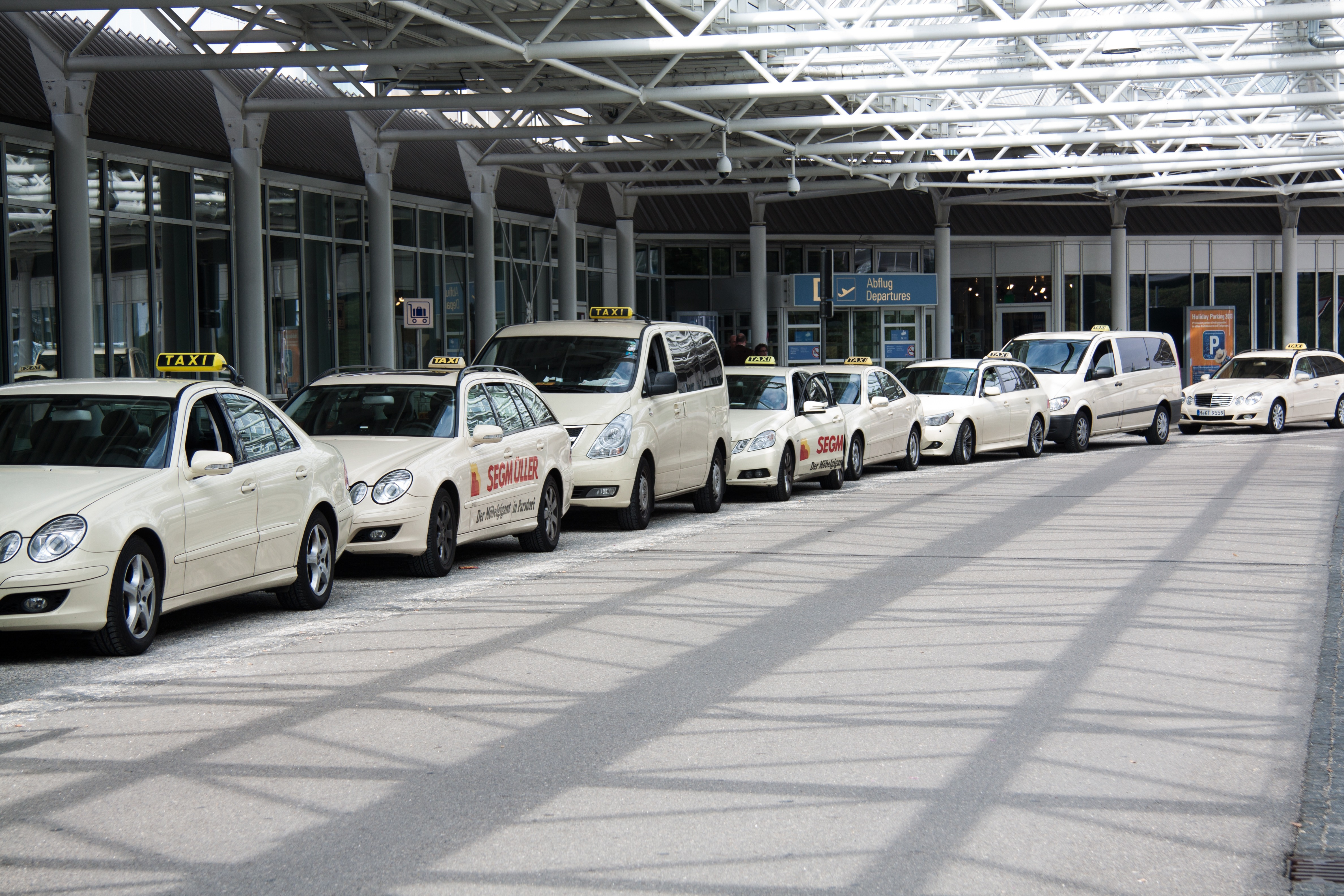 Такси в аэропорту Мюнхена (MUC)